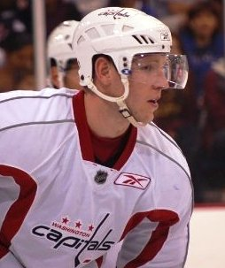 Pic jpg